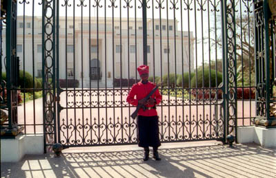 Palais présidentiel, Dakar, Sénégal